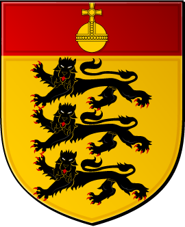 Armoiries de la maison de Waldburg